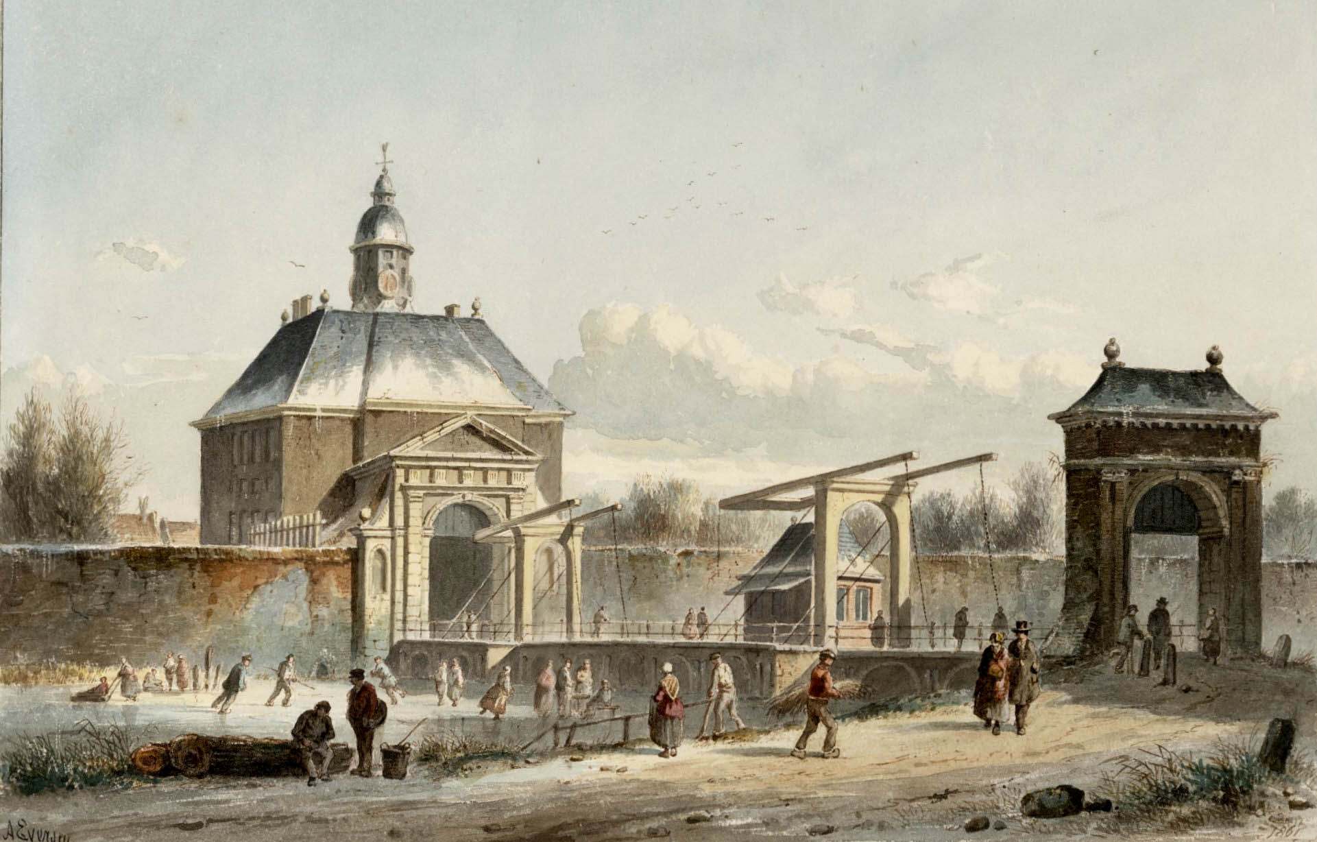 Wintergezicht. De Weesperpoort, ter hoogte van het huidige Weesperplein, met de brug over de Singelgracht.